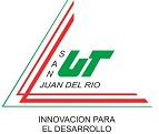 Logo pequeño UTSJR